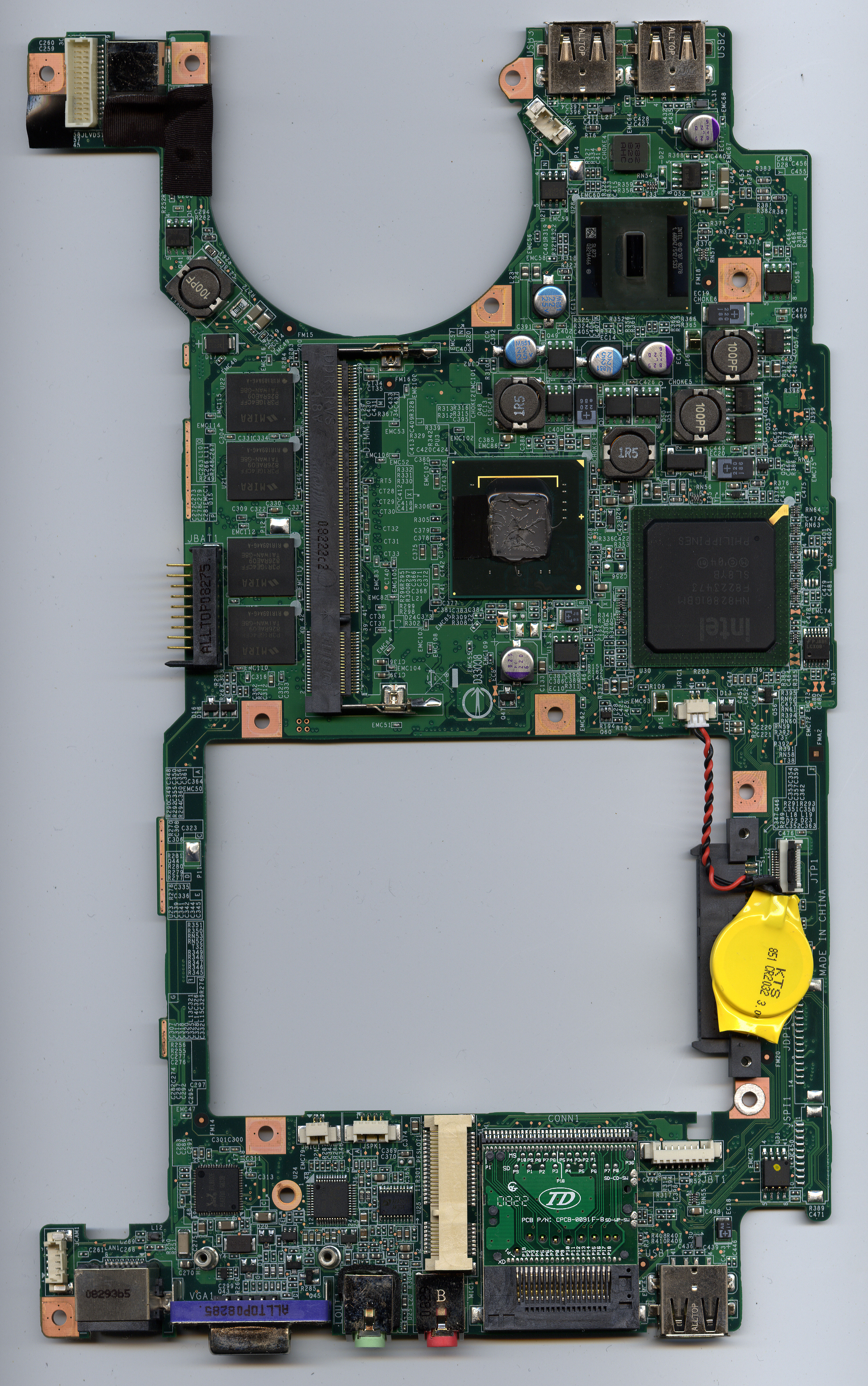 Carte mère du MSI Wind